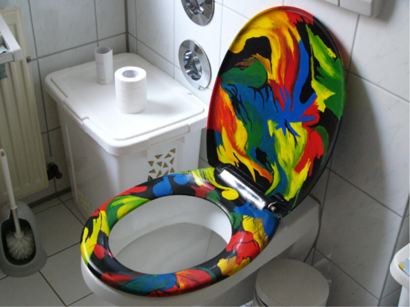 Bunte Klobrille